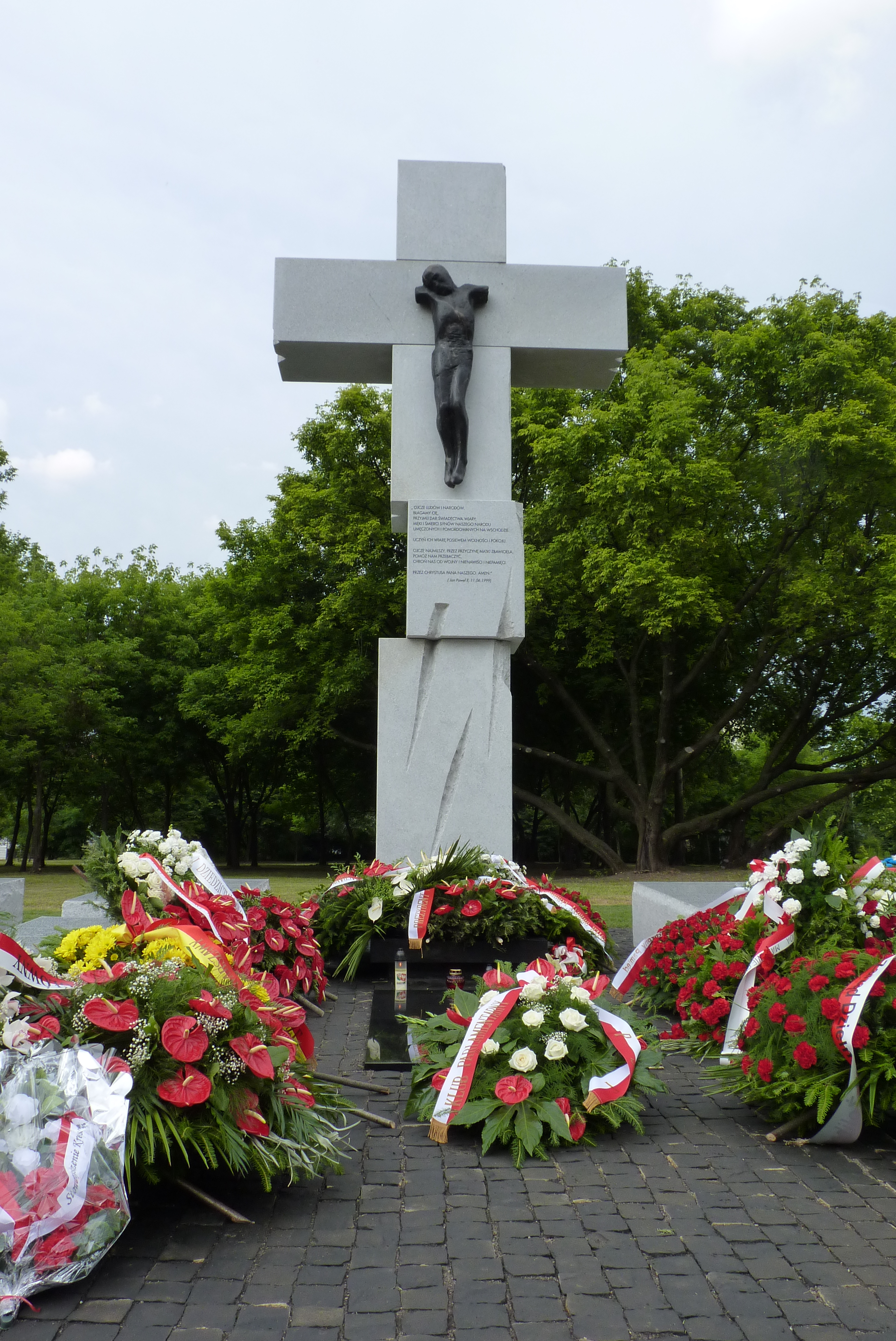 Pomnik w 70 rocznicę rzezi wołyńskiej